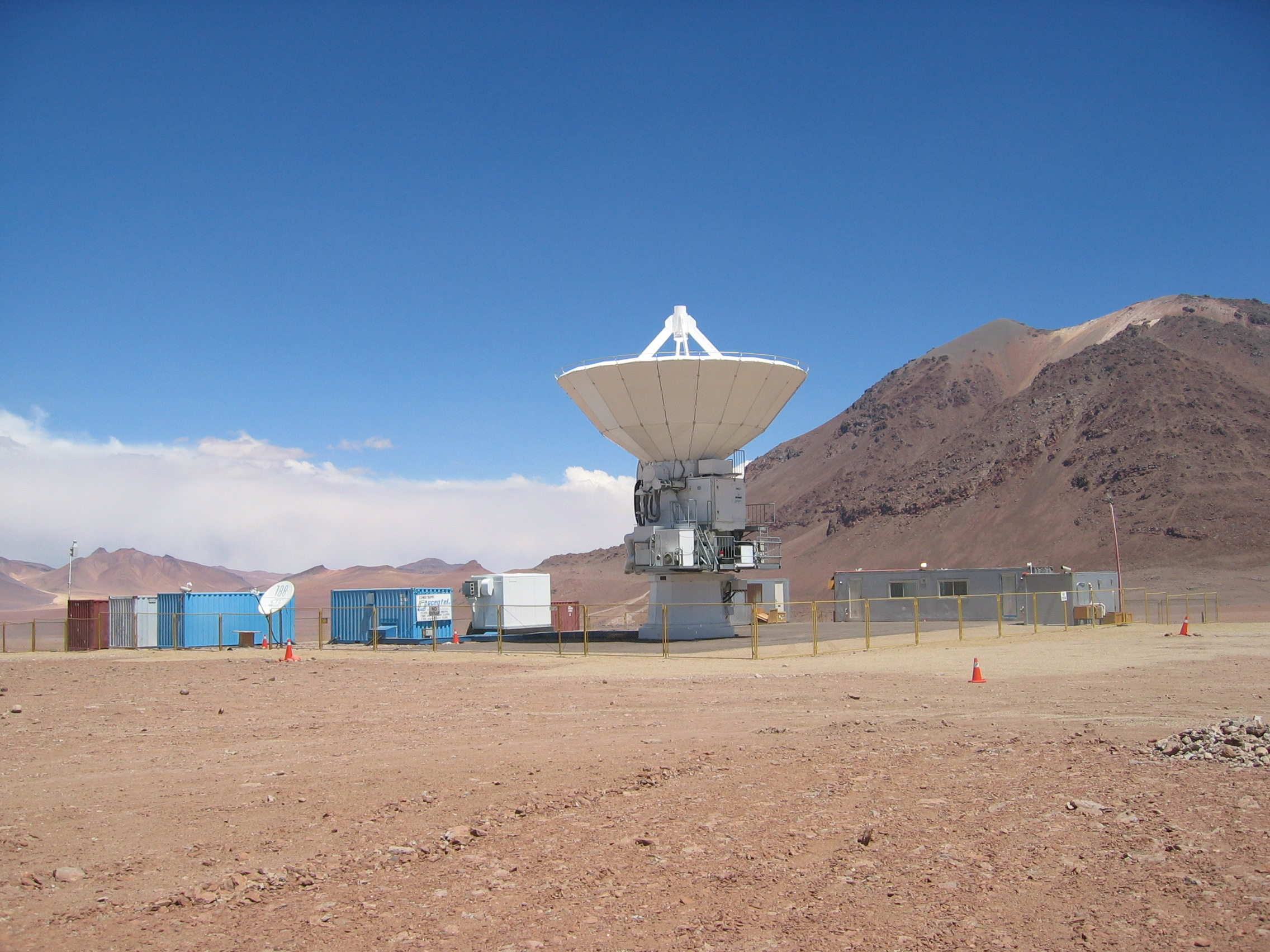 Radiotélescope japonais du programme Atacama Submillimeter Telescope Experiment, sur le site Pampa de Bola (4860 m) au Chili